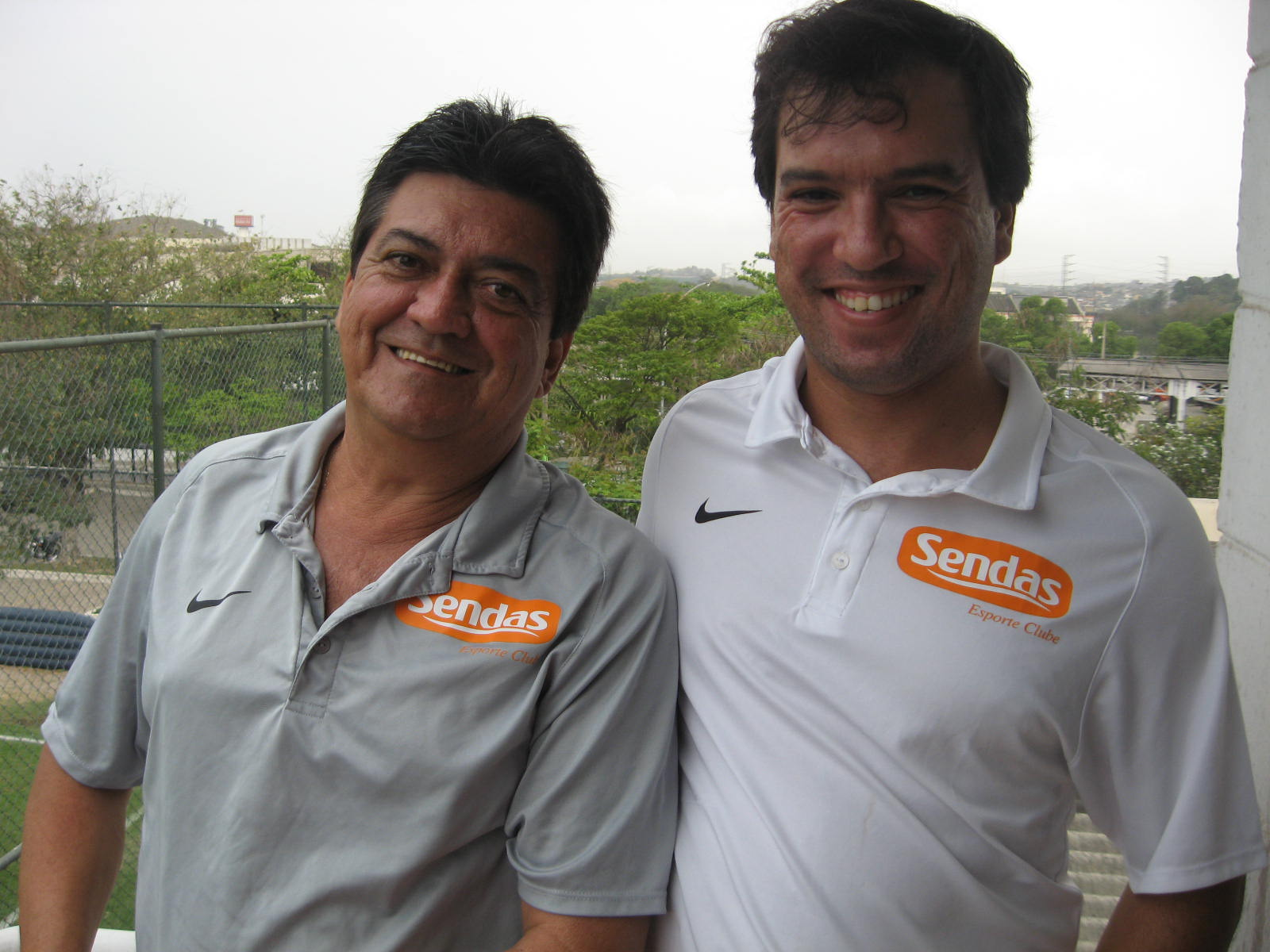 Francisco Carlos e Michel Cravo, dirigentes do Sendas em 2010.